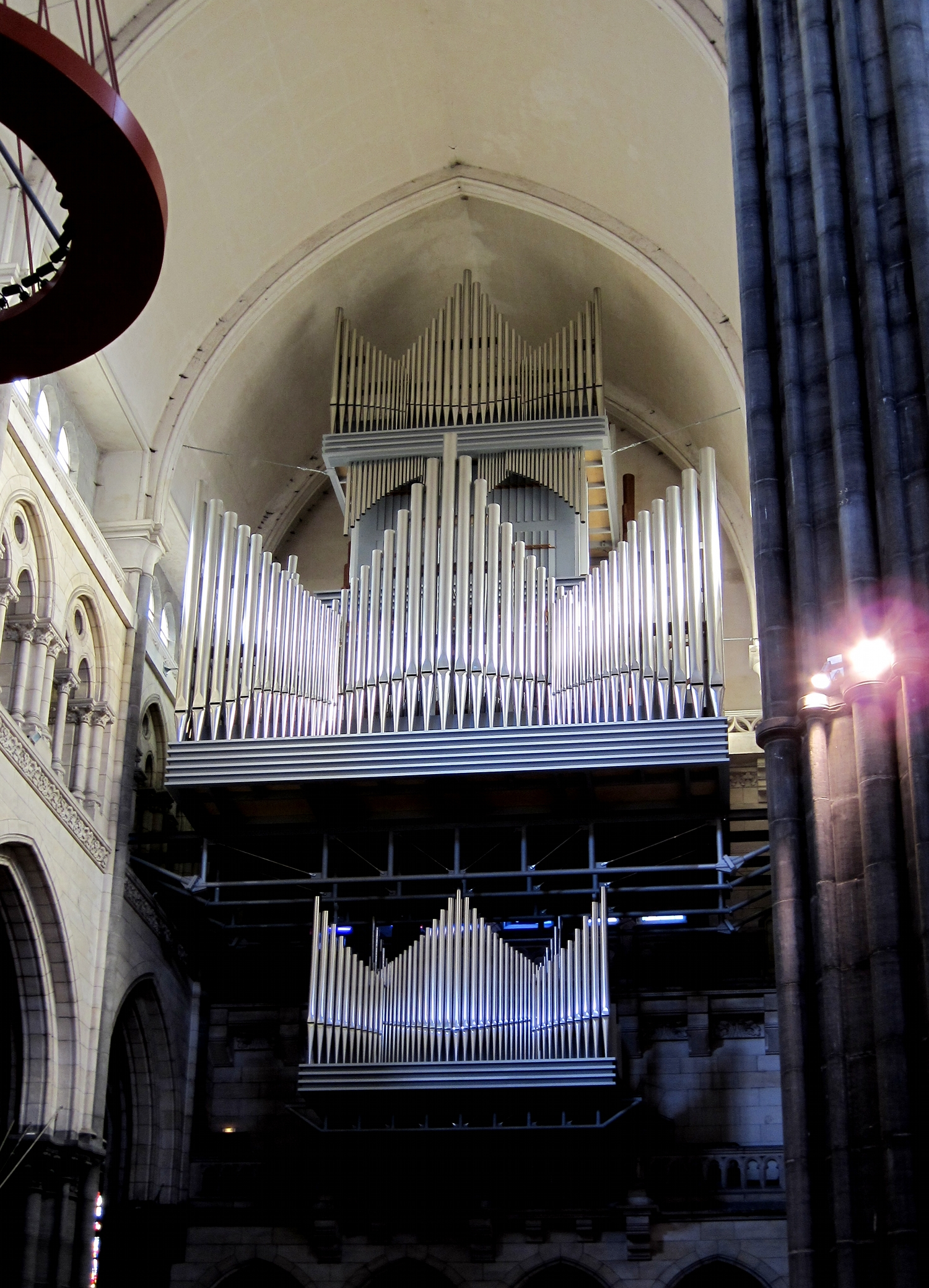 Le grand orgue de la cathédrale Notre-Dame-de-la-Treille à Lille (Nord). Instrument construit entre 1957 et 1966 par les Établissements Danion-Gonzalez pour le studio 104 de Radio-France, démonté en 2007 pour être transféré à la cathédrale Notre-Dame-de-la-Treille